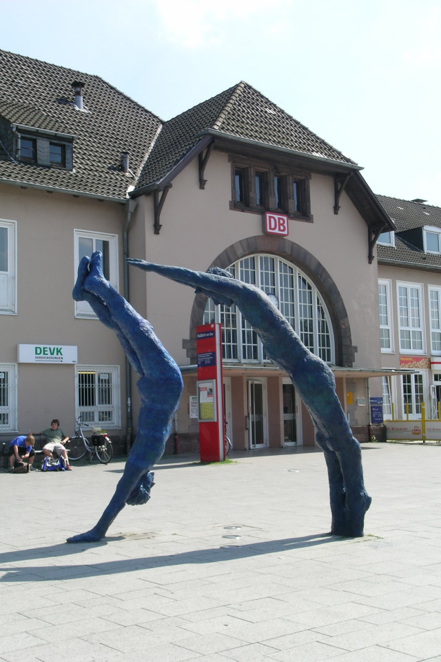 Bahnhof in Haltern am See